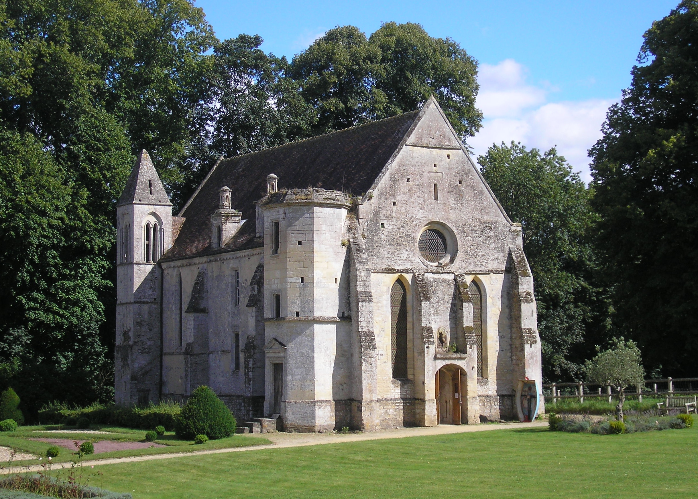 Fontaine-Henry (Normandie, France). La chapelle du château.